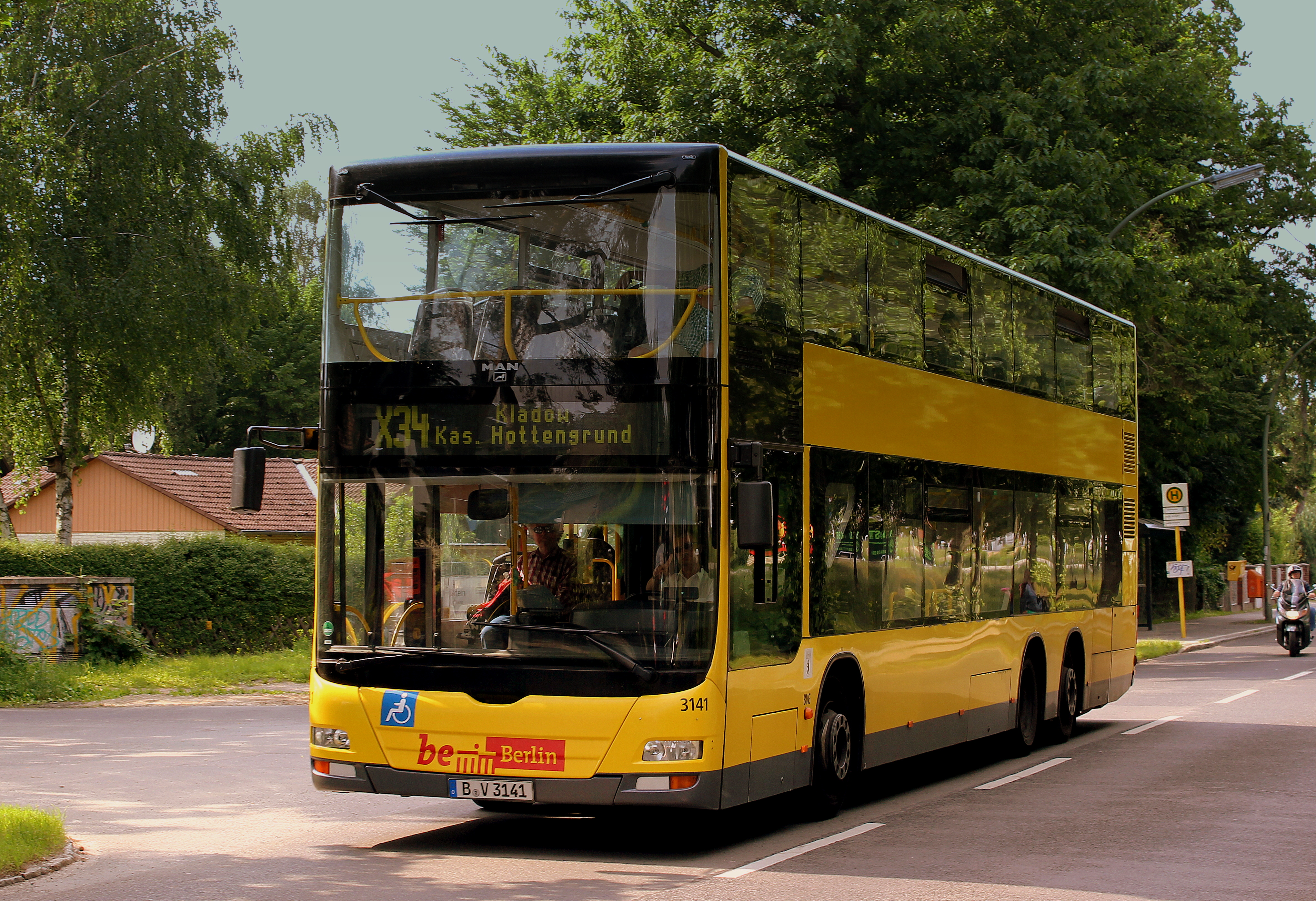 BERLIN BUS MAN DOUBLE DECKER ROUTE X34 NEAR KURPROMANADE SPAUDAU GATOW BERLIN GERMANY JUNE 2013